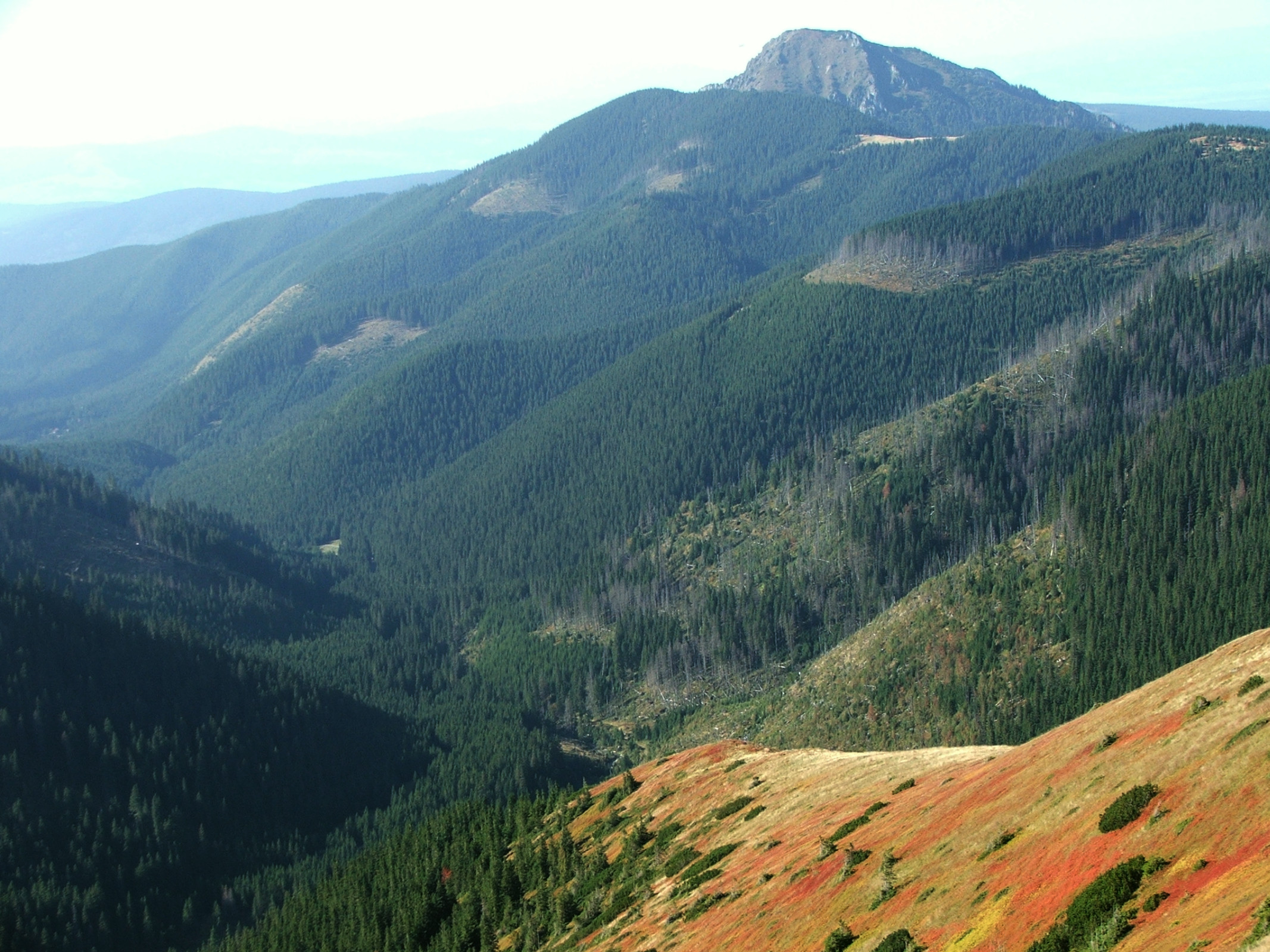 Łatana Dolina, Osobita (West Tatra Mountains)